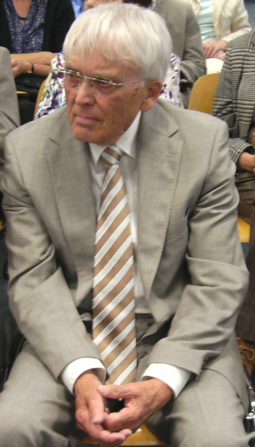 Reiner Kunze (bei einer Lesung in St. Ingbert)